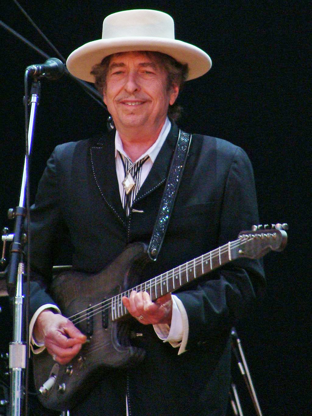 Bob Dylan, en una actuación en Vitoria-Gasteiz, en el Azkena Rock Festival.